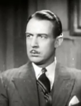 Lester Matthews. Bande-annonce du film "Le monstre de Londres" (1935)